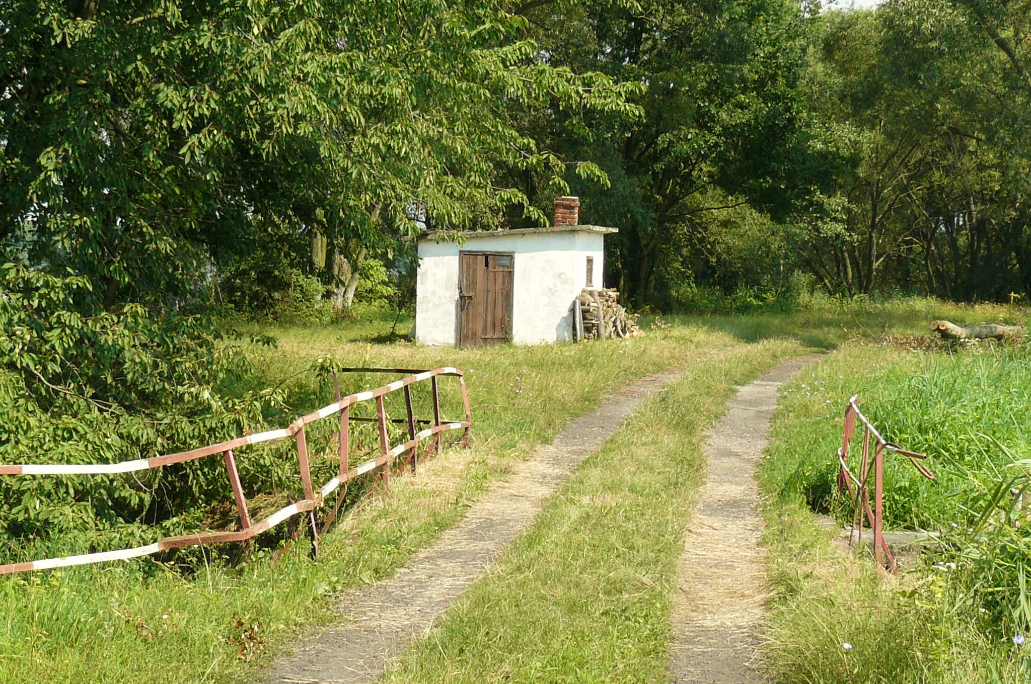 Stawy Milickie, kompleks Stawno, staw Rudzki. Domek rybaków.